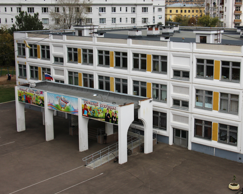 Новое здание школы